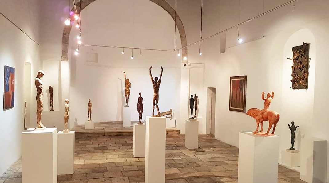 Izložba u Galeriji svetog Krševana, Šibenik, godina 2019